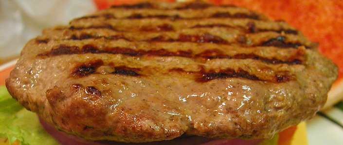 Hamburger patty